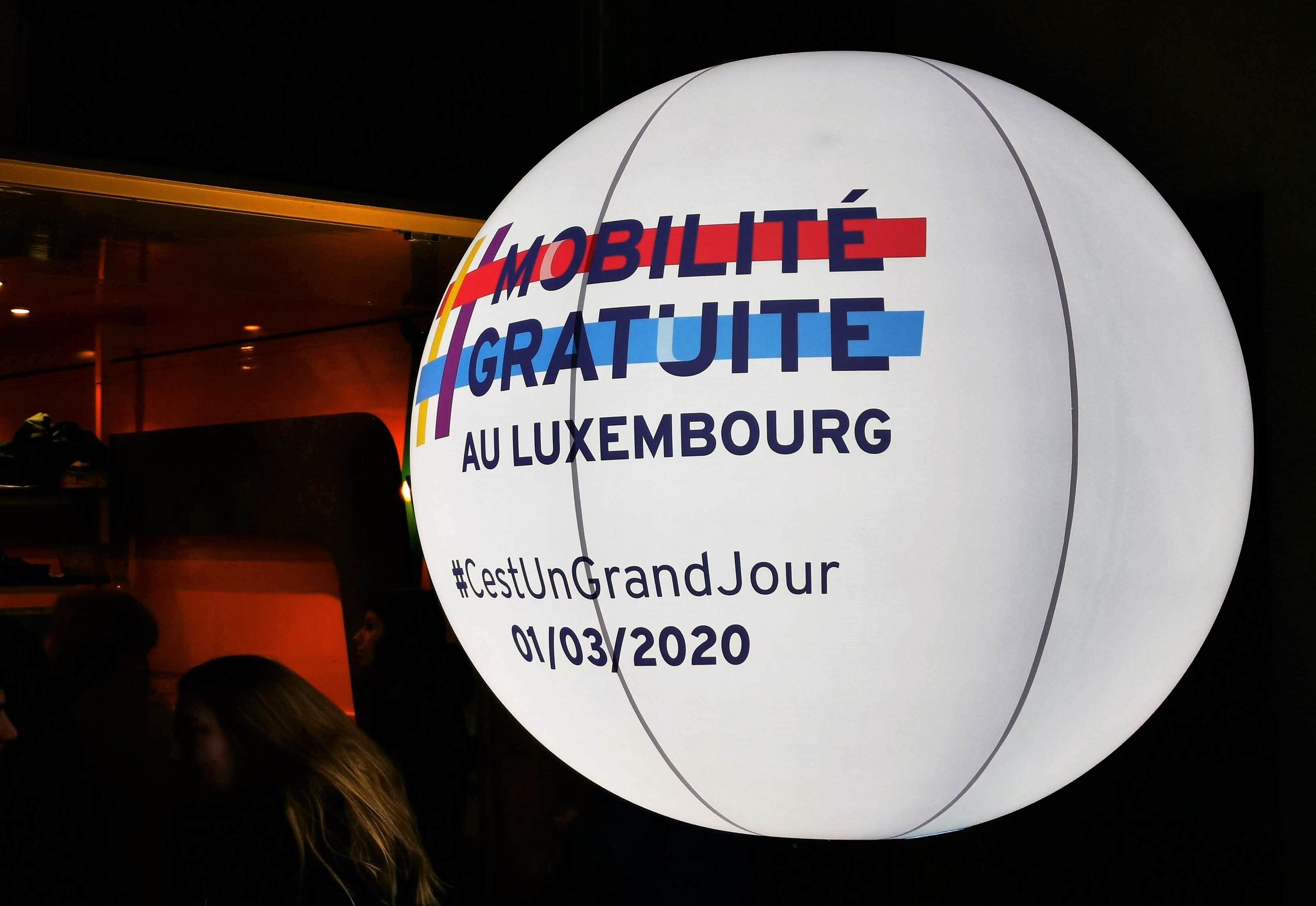 Ballon publicitaire "Mobilité gratuite au Luxembourg".